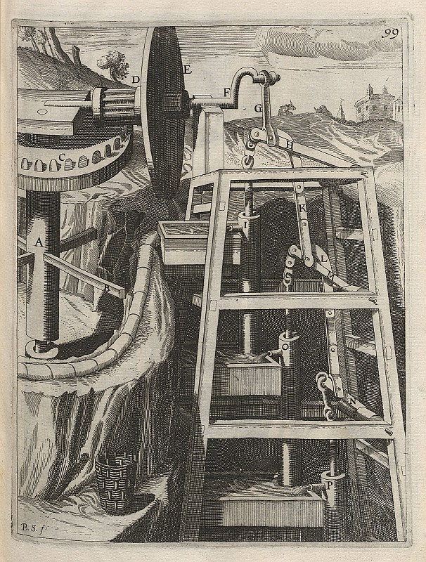 Original image description from the Deutsche Fotothek Mechanik & Wasserförderung & Pumpe